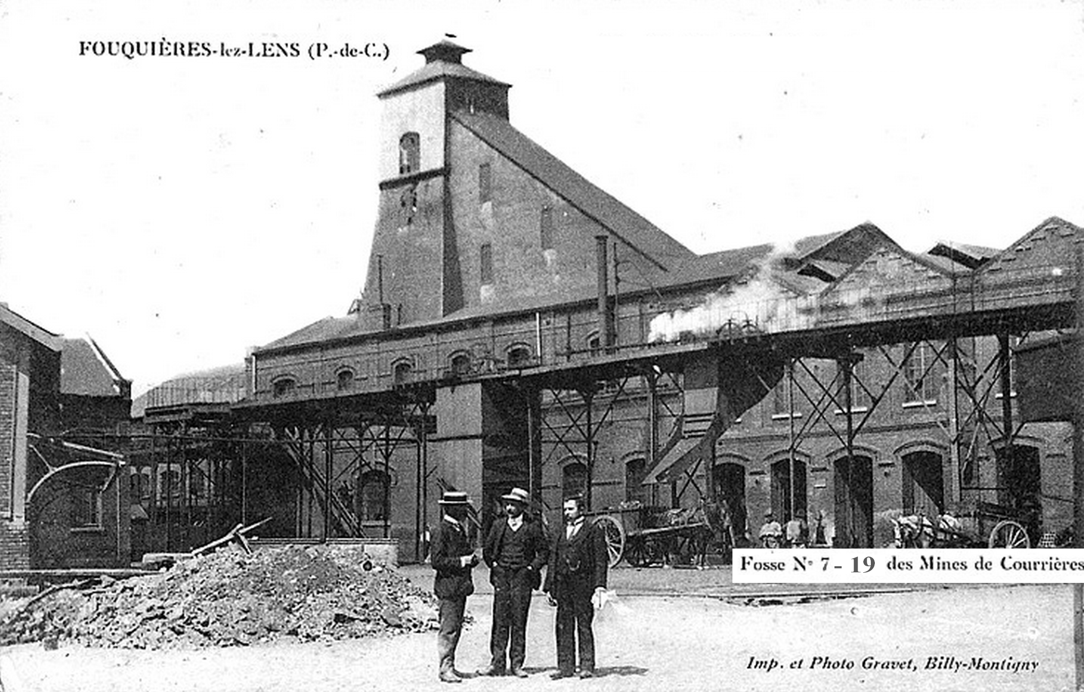 La fosse n° 7 - 19 dite Henri Maurice de la Compagnie des mines de Courrières était un charbonnage du bassin minier du Nord-Pas-de-Calais constitué de deux puits situé à Fouquières-lès-Lens, Pas-de-Calais, Nord-Pas-de-Calais, France.